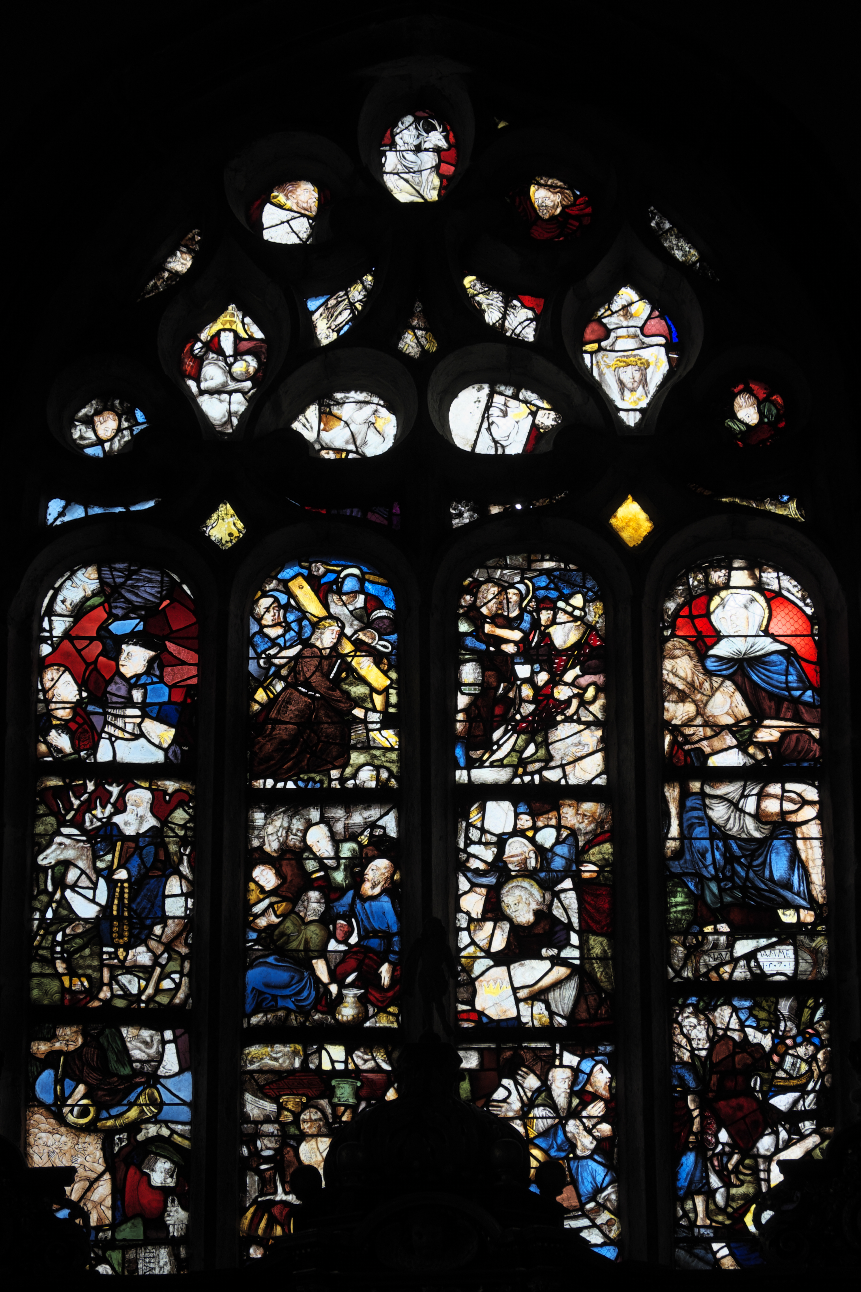 Katholische Kirche Saint-Edern in Lannédern im Département Finistère (Region Bretagne/Frankreich), Bleiglasfenster (baie 0) aus dem 16. Jahrhundert; Darstellung: Szenen der Passion, heiliger Edern auf einem Hirsch reitend